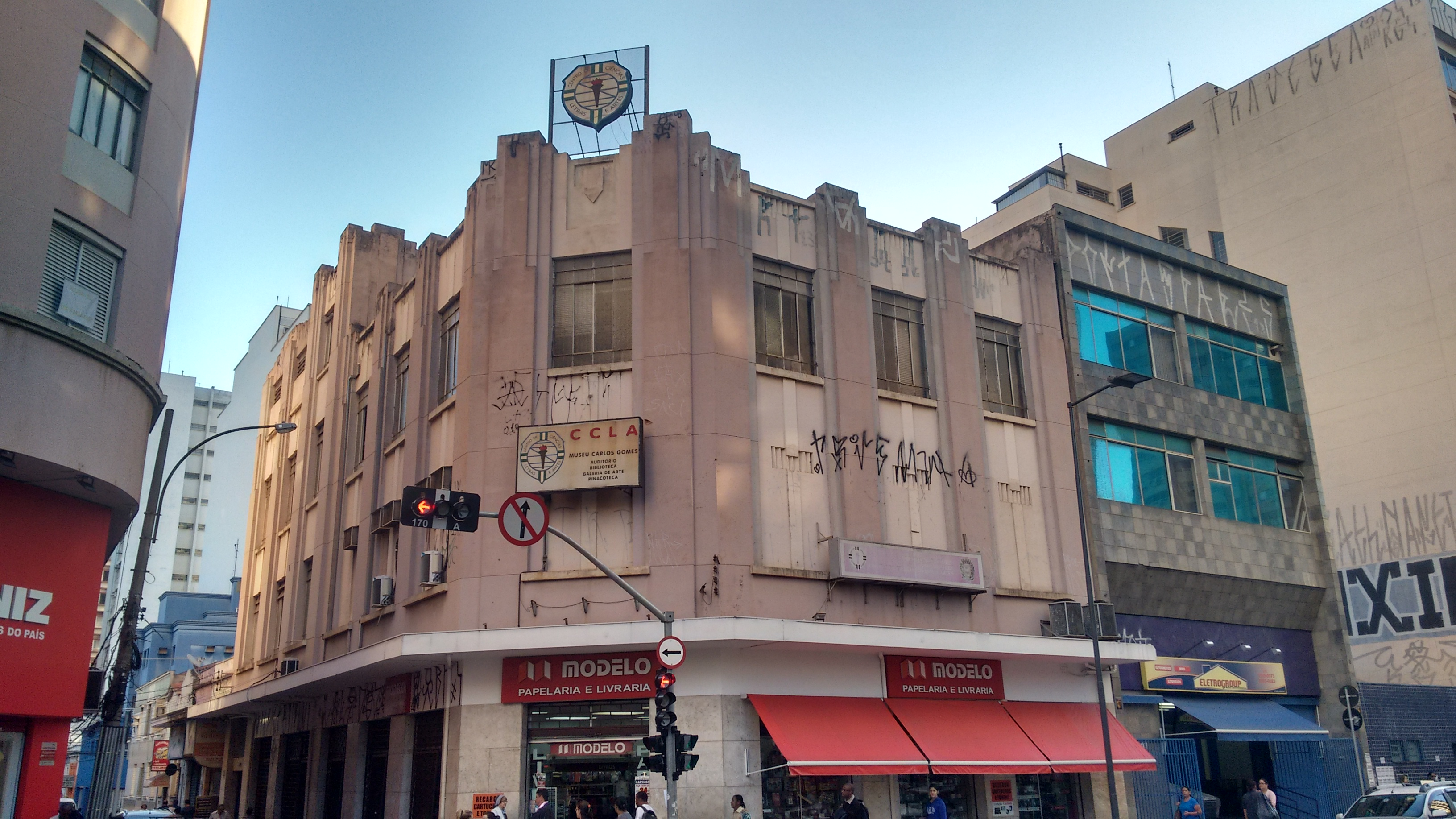 Fachada Pinacoteca do Centro de Ciências, Letras e Artes em Campinas/SP